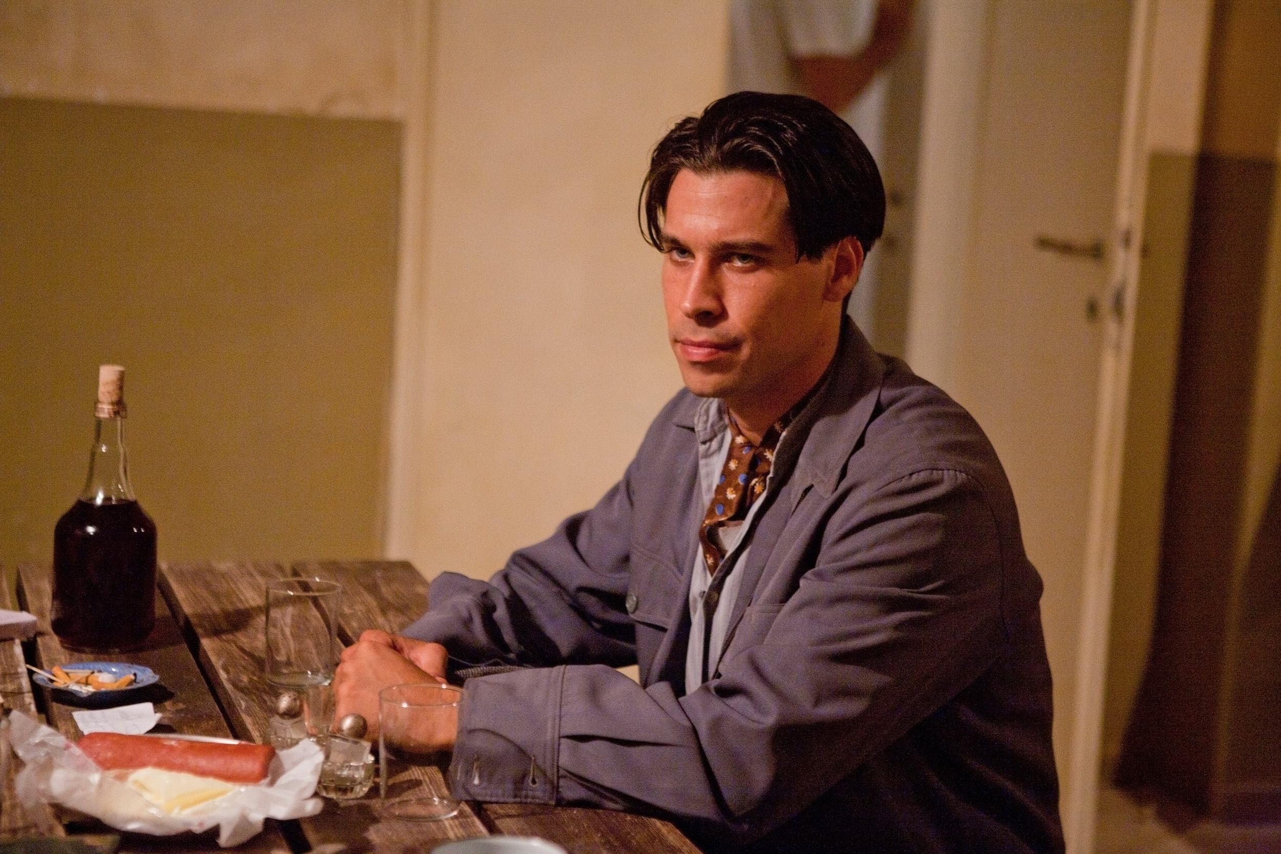 גיא אדלר מתוך ברקיע החמישי